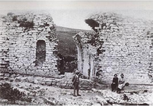 Vecchia foto della Funtanazza